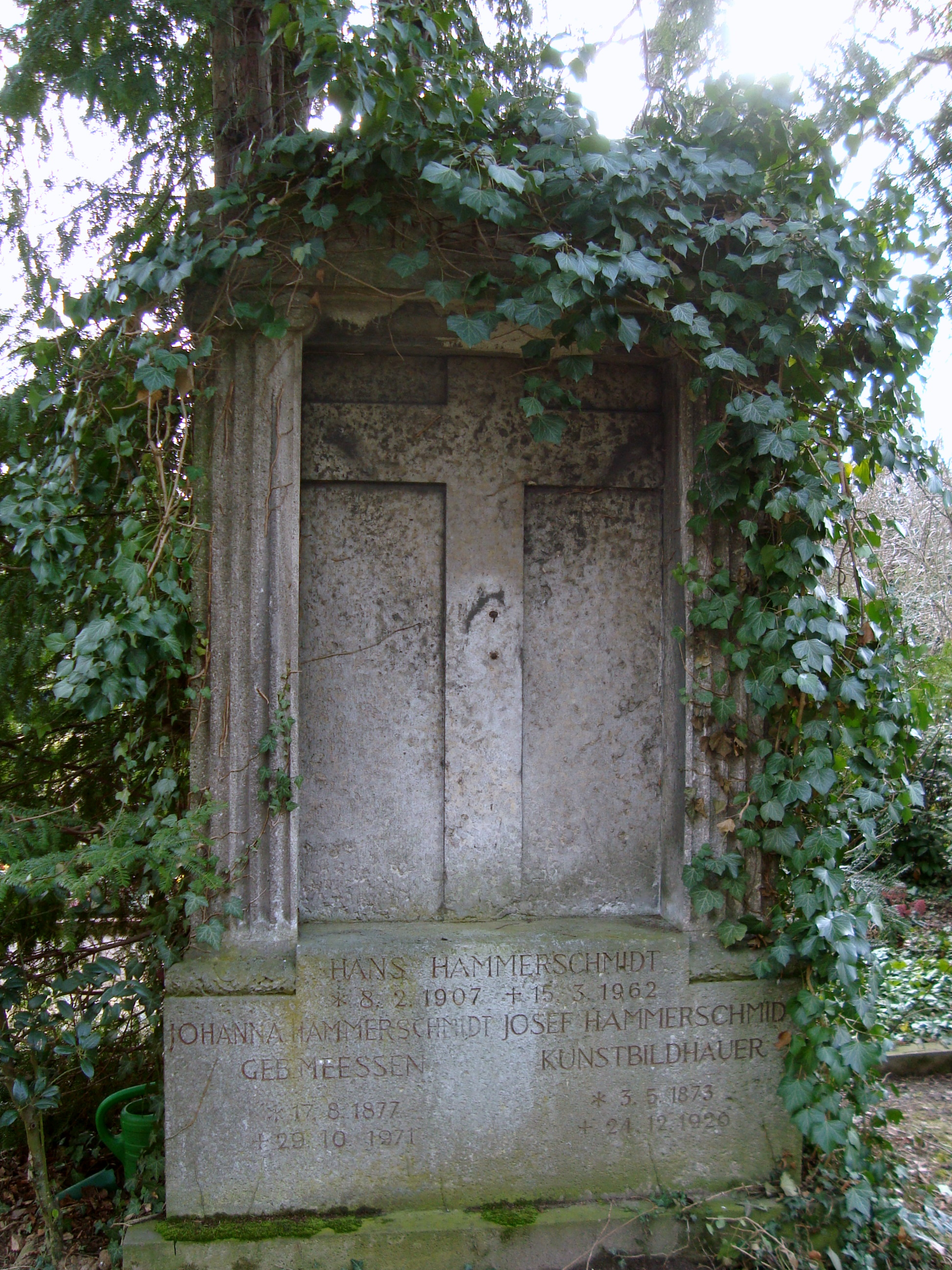 Grabmal Joseph Hammerschmid, Düsseldorf-Heerdt